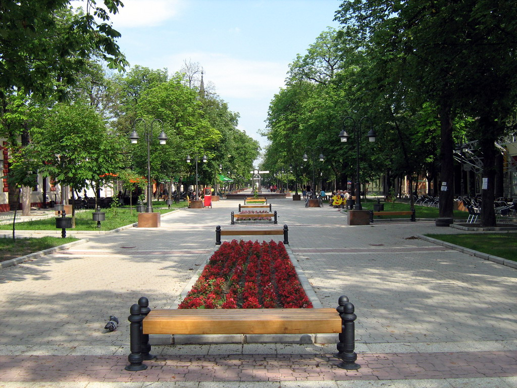 Дунав код Апатина Licensing